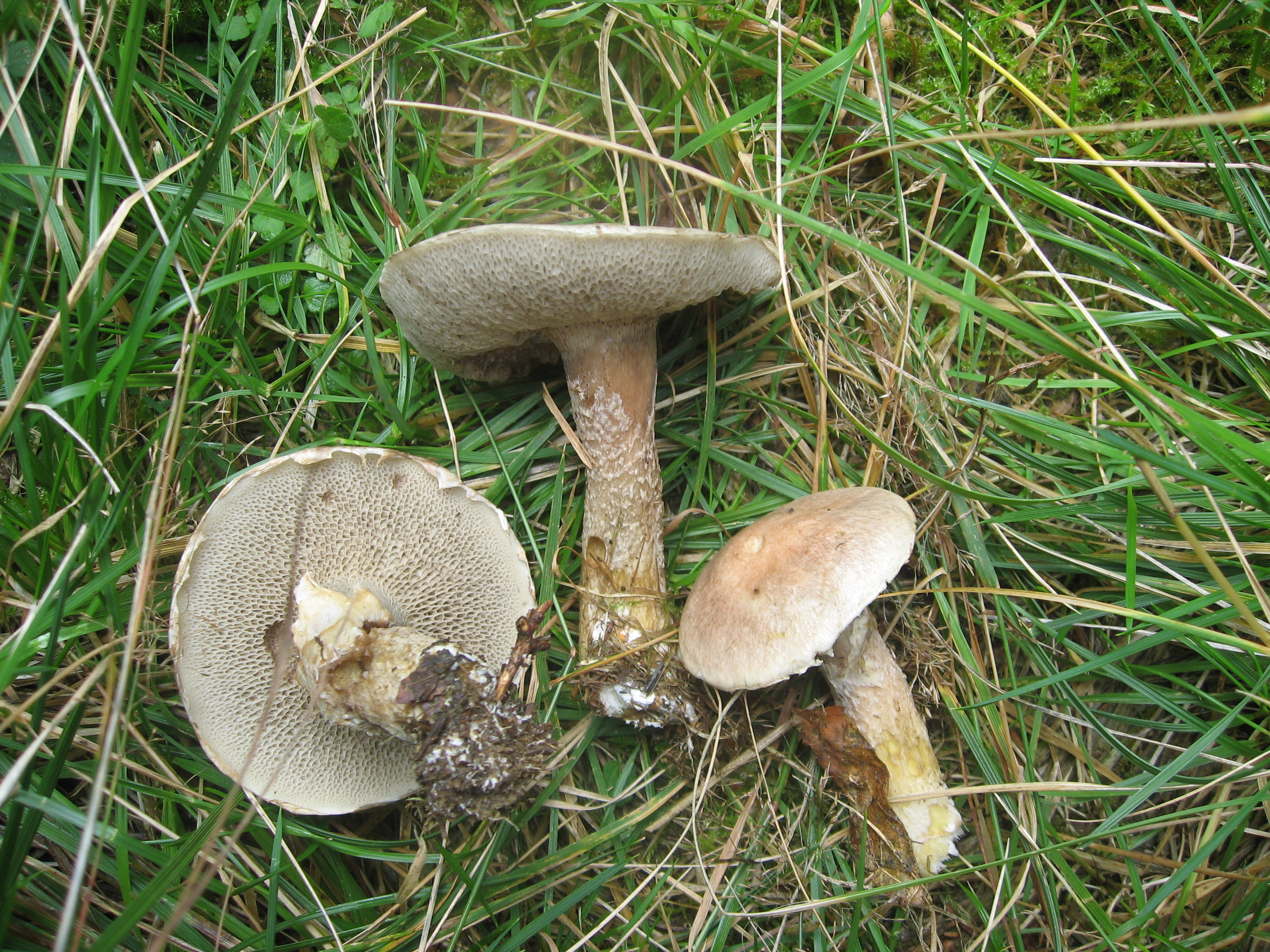 Klouzek slizkýLatina: Suillus viscidus